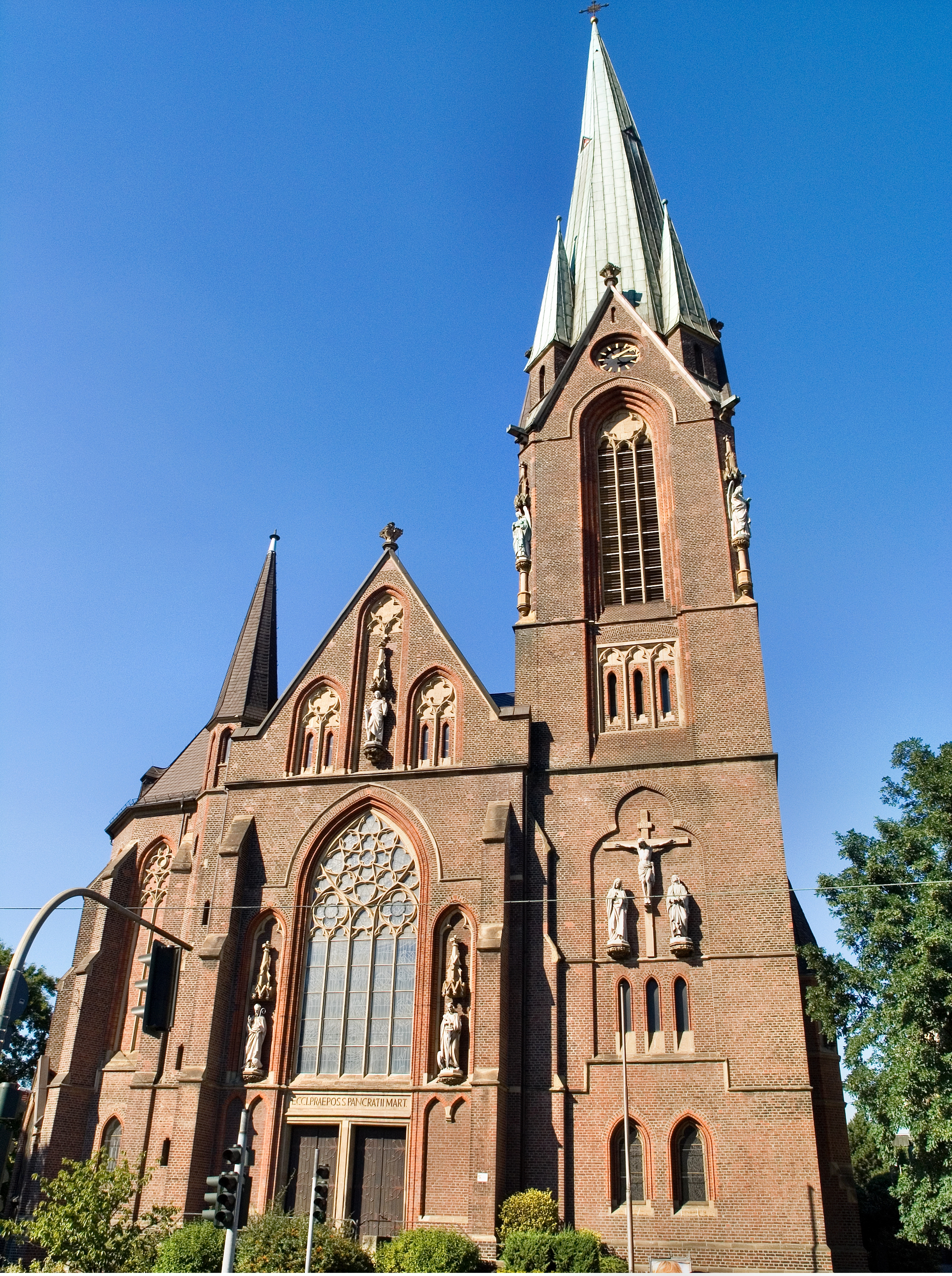 Северный Рейн - Вестфалия, Оберхаузен - церковь Святого Панкратия